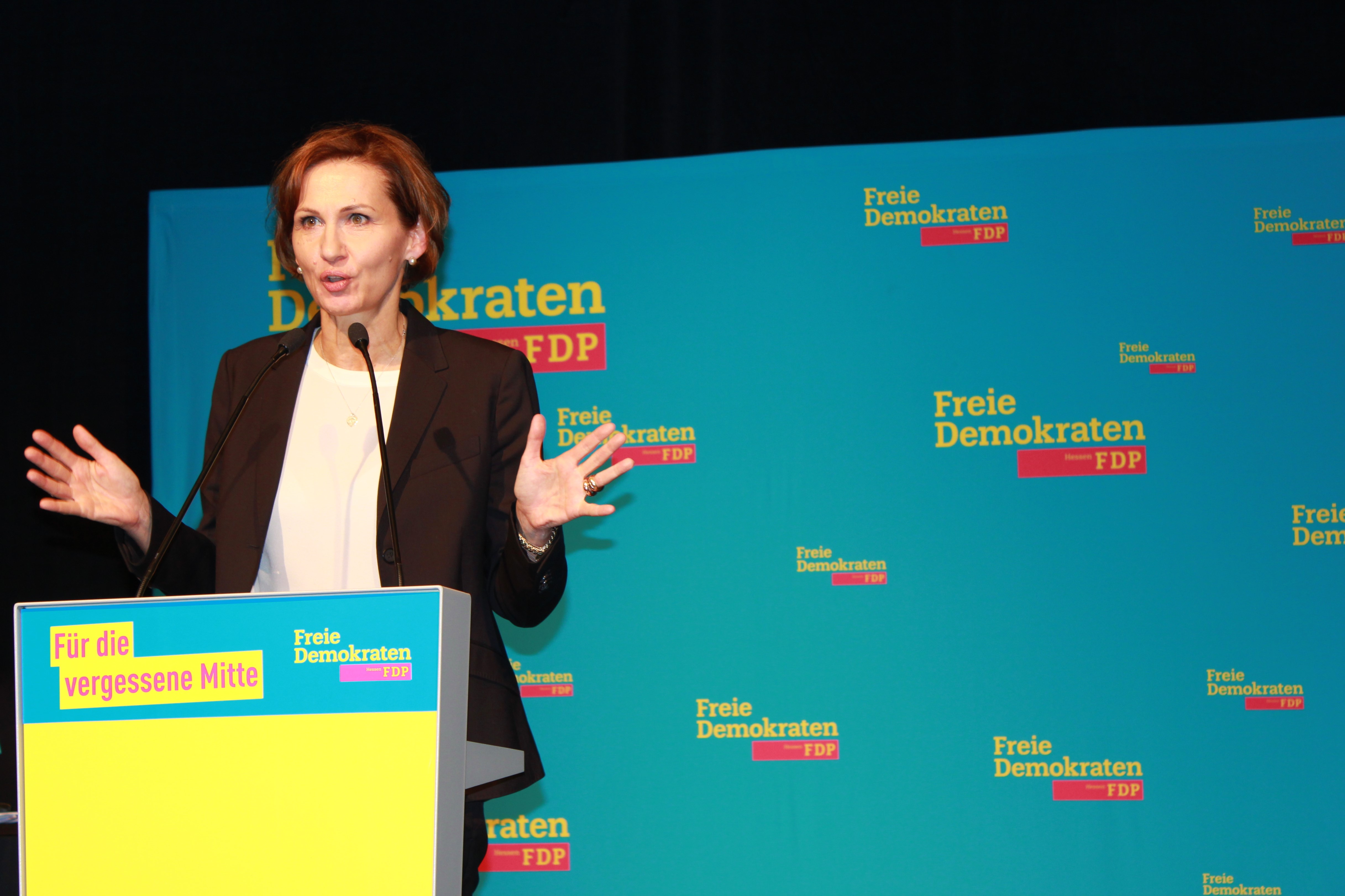 Landesparteitag